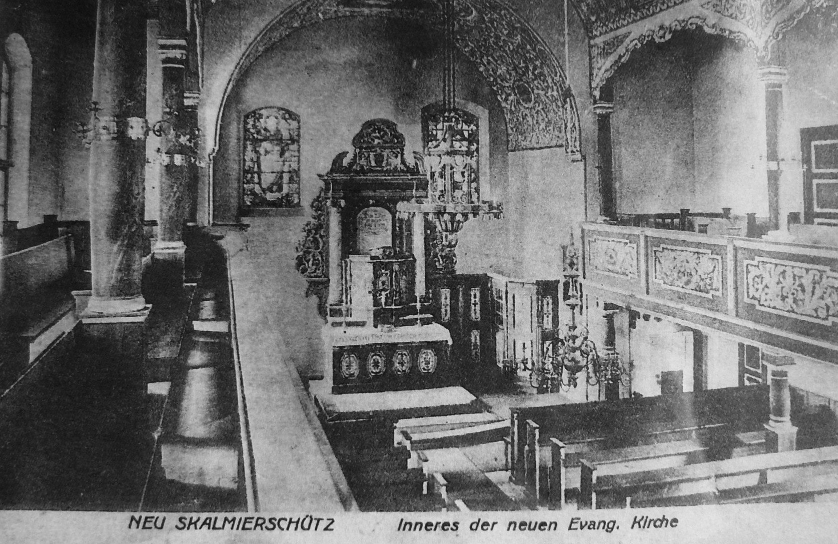 Nowe Skalmierzyce, kosciol MB Nieustajacej Pomocy, stara pocztówka sprzed I wojny światowej.